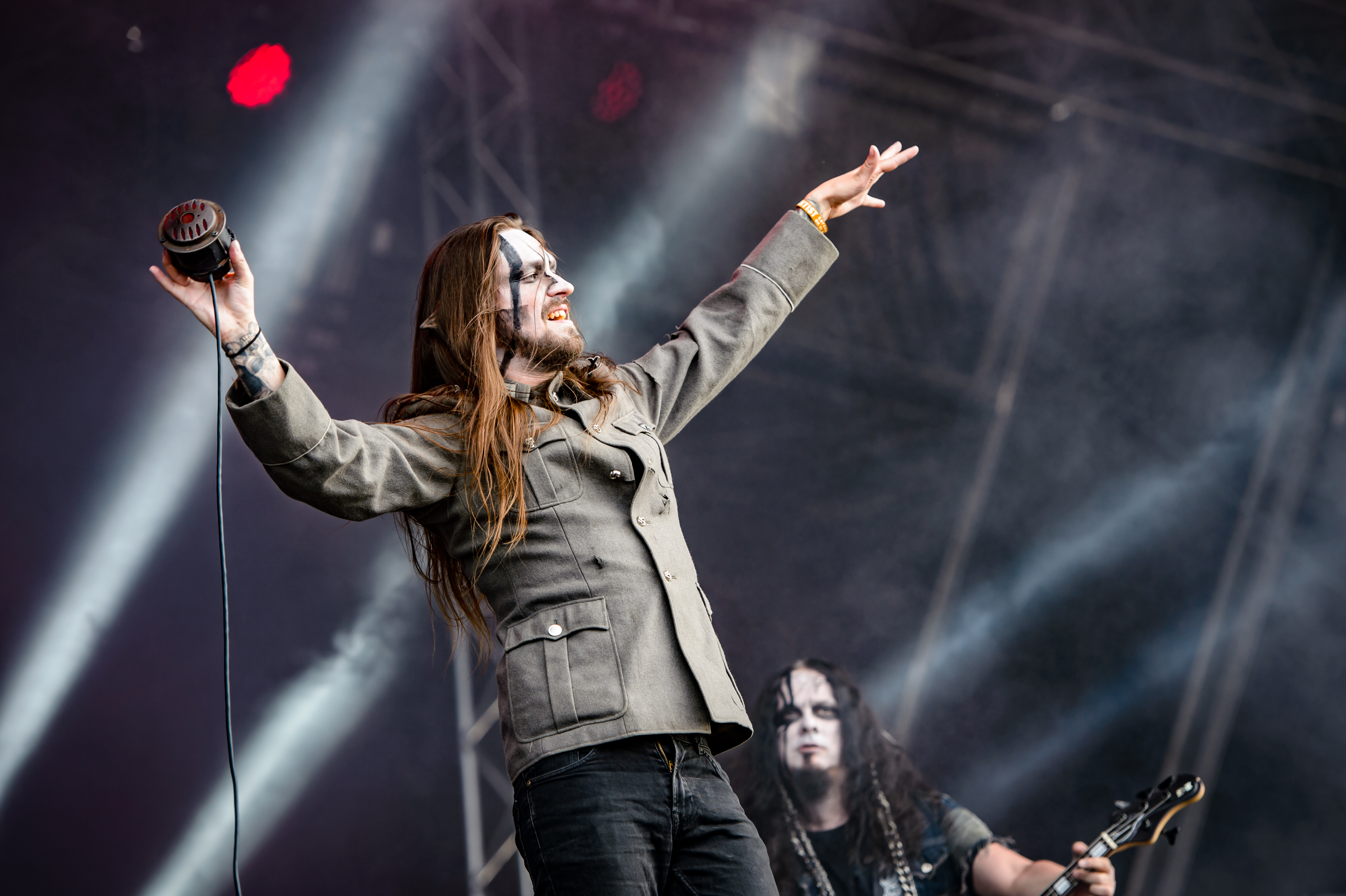 'RockHarz Open Air 2016; Ballenstedt': 'Finntroll'